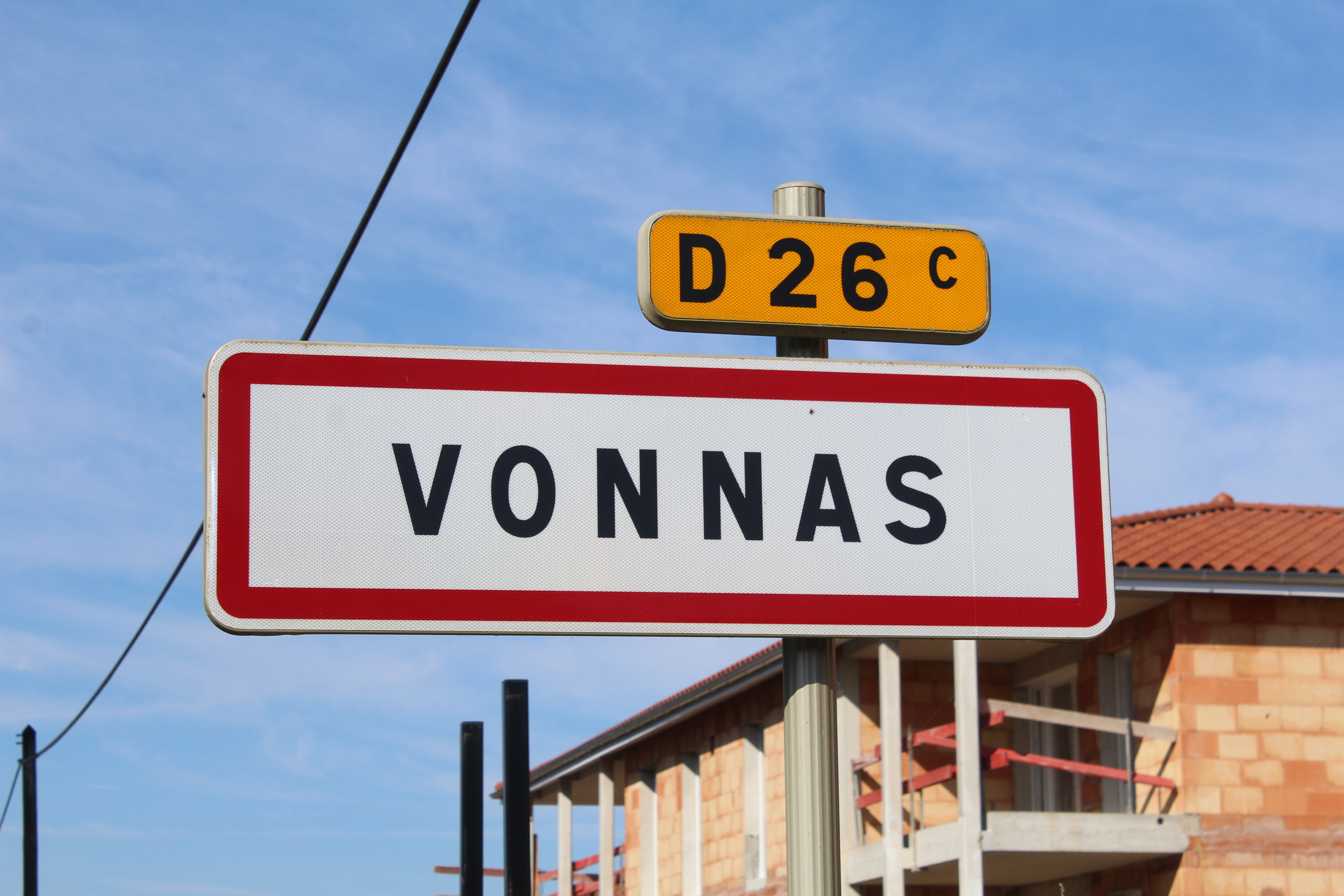 Panneau d'entrée de Vonnas.